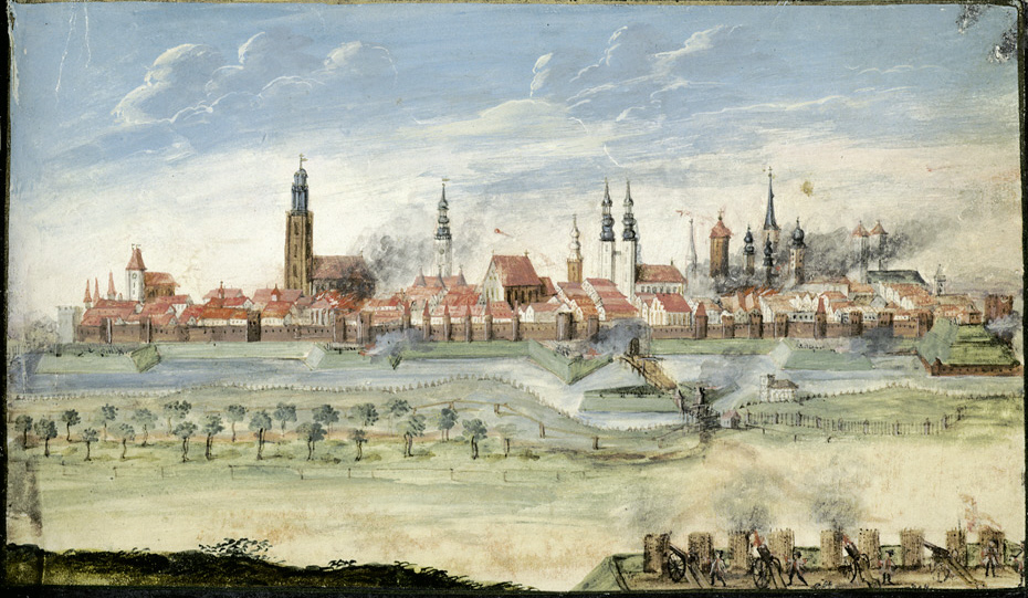 Breslau im Siebenjährigen Krieg. Aus dem Stammbuch des Kaufmanns Johann Gottfried Rüde aus Lauban (Schlesien), 1754-1796, mit Nachträgen 1869-1888; neben dem Eintrag vom 20. September 1760 "... erinnere Dich des 1ten Aug. 1760 unßer Stadt Breßlau; was Deine Jugend in einer Belagerung erfahren."